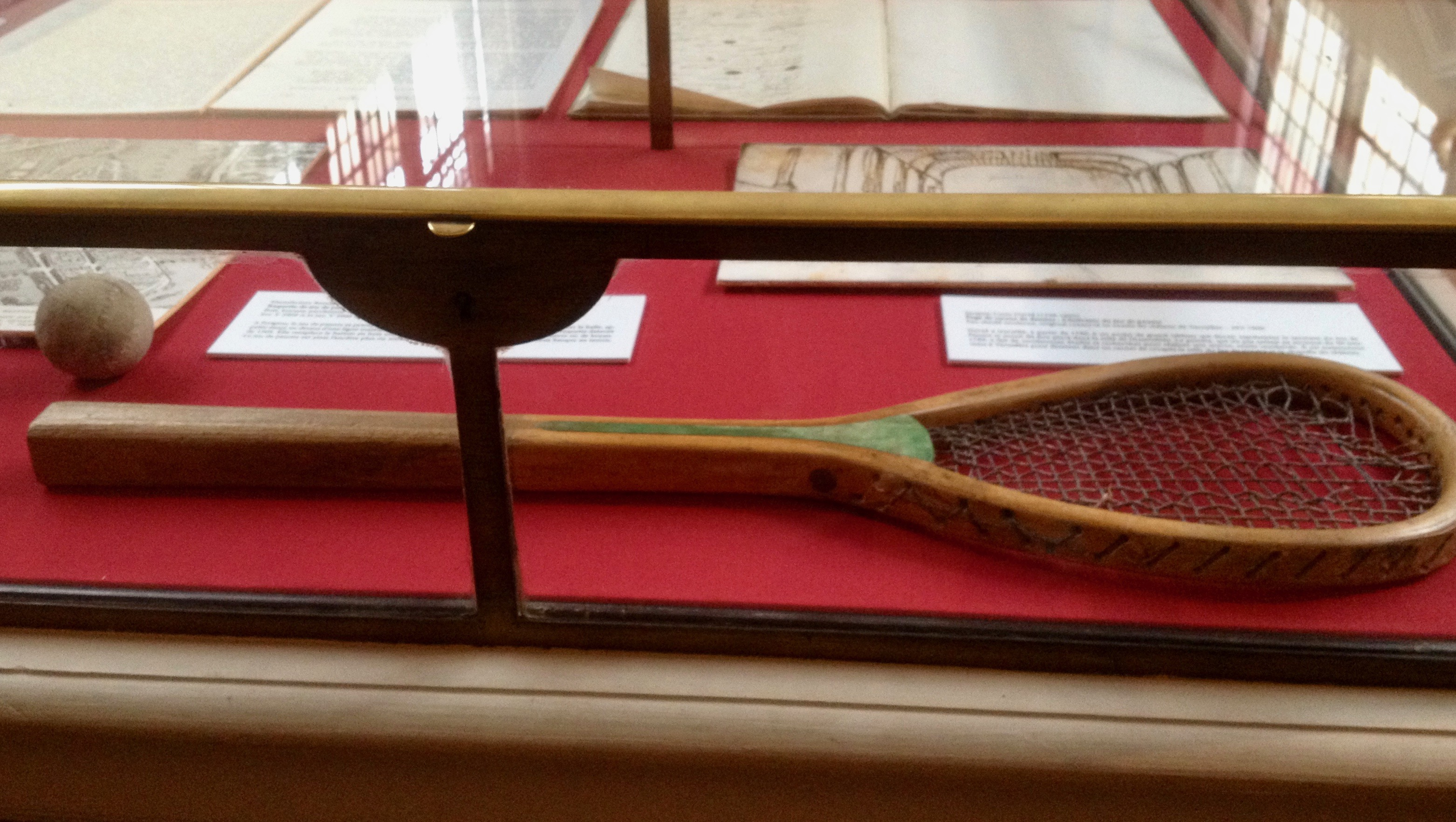 Manufacture Brouaye, boix, boyaux, parchemin, Inv. 5909 A, et Inv 5909 B: "La première mention de la raquette daterait de 1505. Elle remplace le battoir en bois utilisé au XVe siècle et possède un cordage de chanvre ou de boyau.